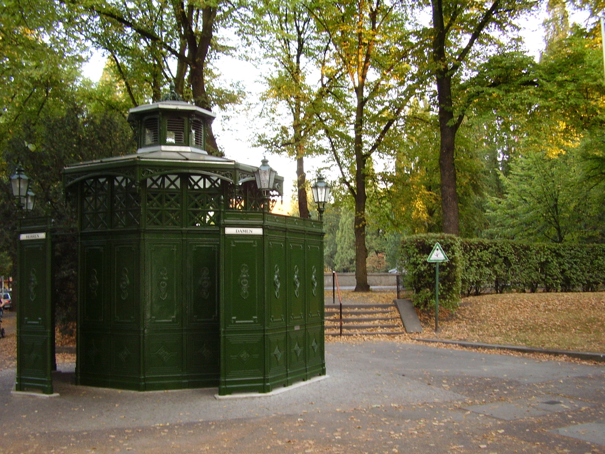 Das wiederhergestellte „Café Achteck“ wurde anlässlich der Eröffnung des jährlich stattfindenden „Rheingauer Weinbrunnens“ am Rüdesheimer Platz in Berlin Charlottenburg-Wilmersdorf im Mai 2006 eingeweiht.